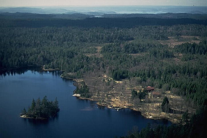 Torpet Nya Försöket vid Stora Holmevattnet. Raststuga. Bilden täcker inga fornlämningar. Motiv: Bredfjället Nyckelord: Flygbilder, Riksintressen Kategori: Insjömiljöer, Torp Torpet Nya Försöket vid Stora Holmevattnet. Raststuga. Bilden täcker inga fornlämningar.